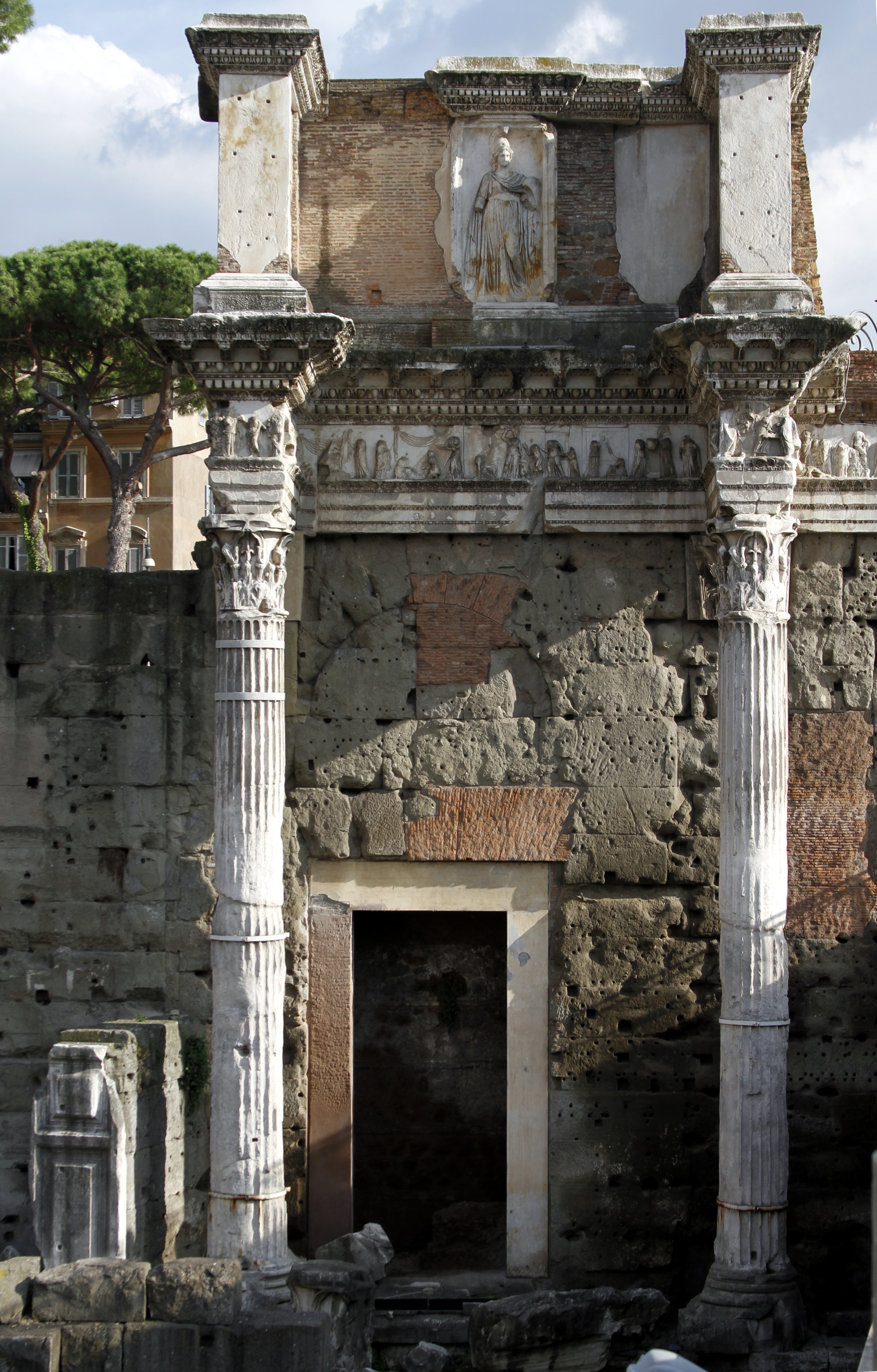 Forum of Nerva - Rome